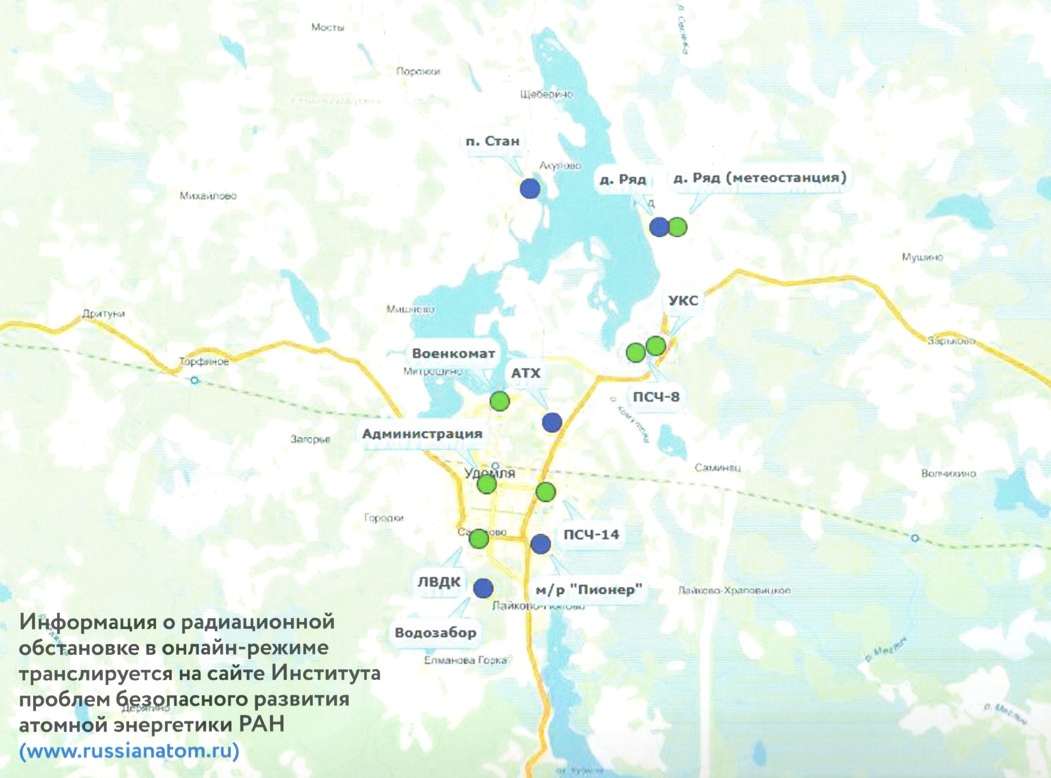 Мониторинговые станции система АСКРО